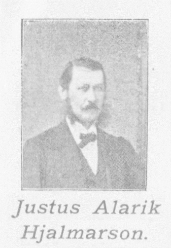 Porträtt ca 1870